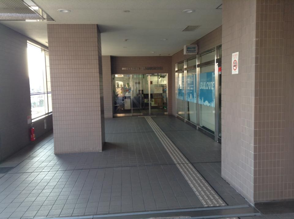 JR阪和線堺市駅前にある、中央図書館の分館の外観（玄関）です。